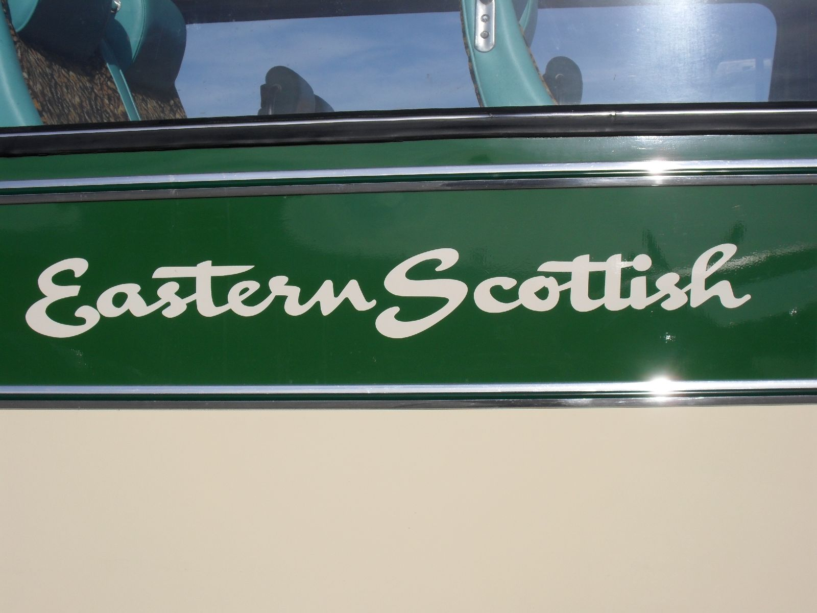 BSG537L